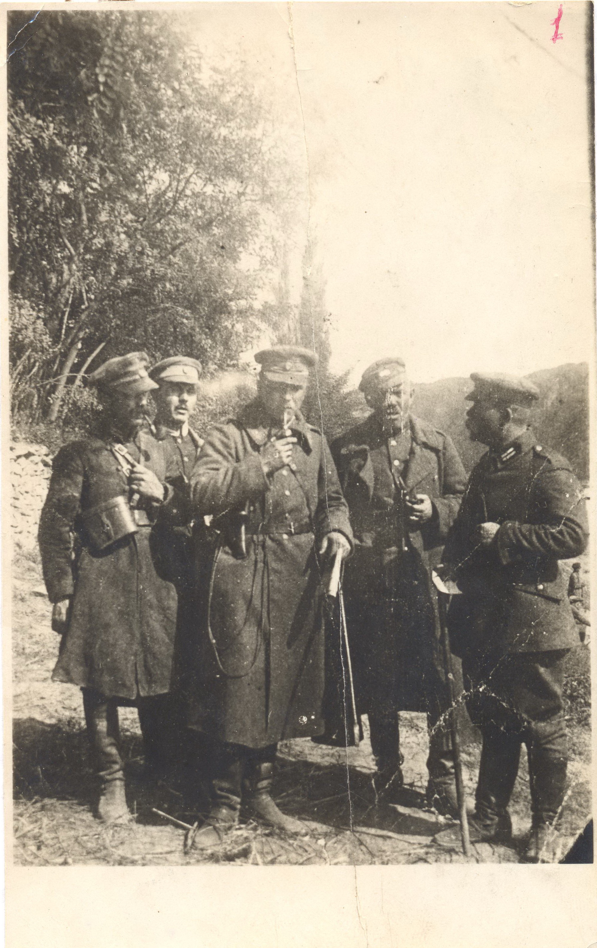 Штаб 3-ї Залізної Стрілецької дивізії на позиції близ Дністра. 1920 рік (напередодні переправи біля м. Городенка.)Зліва направо: начальник гарматної бригади полковник Г.Чижевський, ад`ютант штабу дивізії сотник Коваленко, генерал-хорунжий О.Удовиченко, заступник комдивізії В.Ольшевський, командир інженерного куреня П. Харченко.